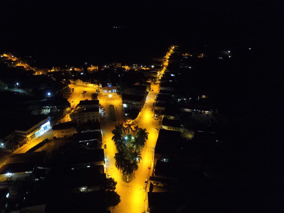 Imagem aérea noturna de Vermelho Novo